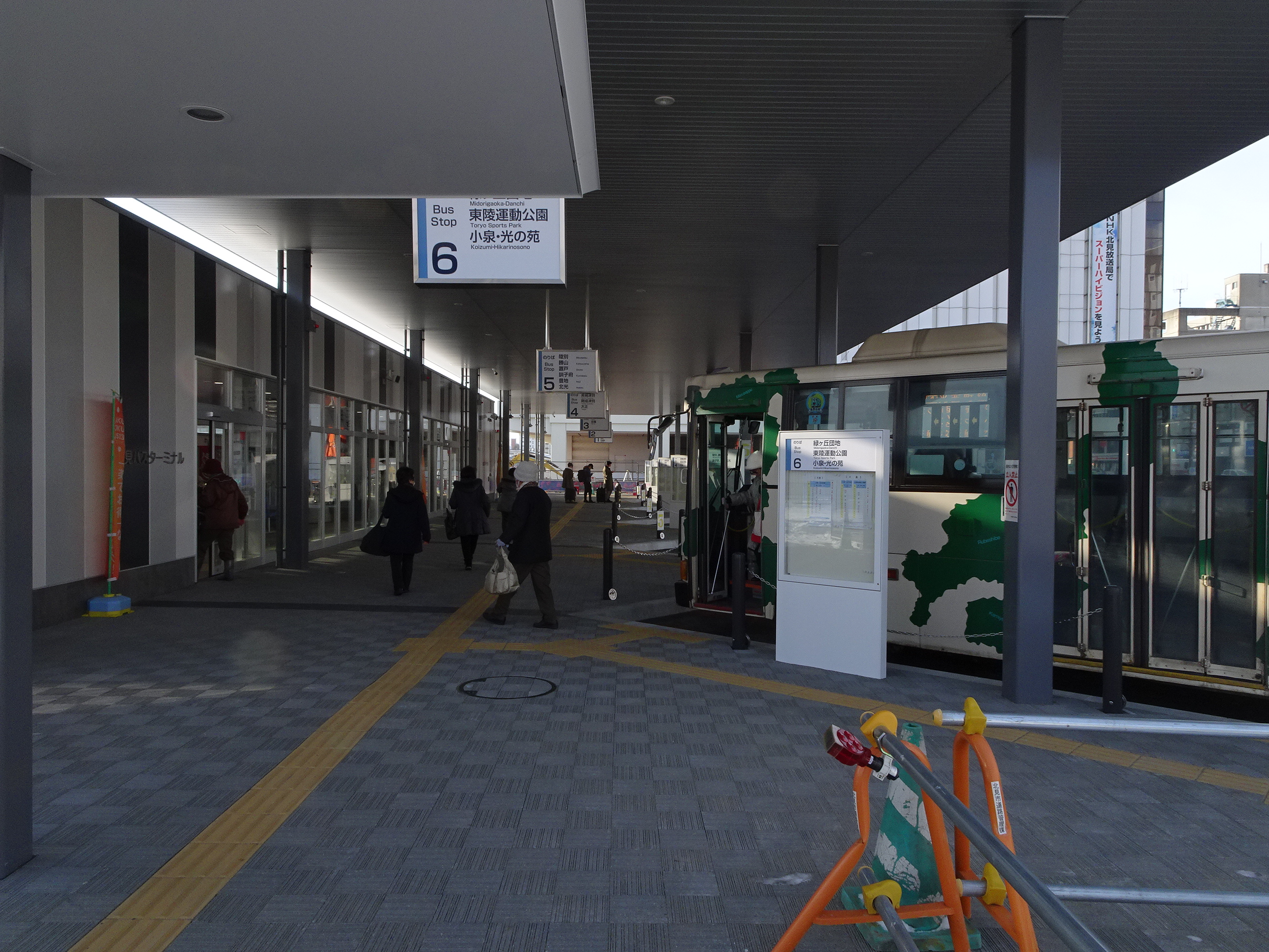 Kitami bus terminal